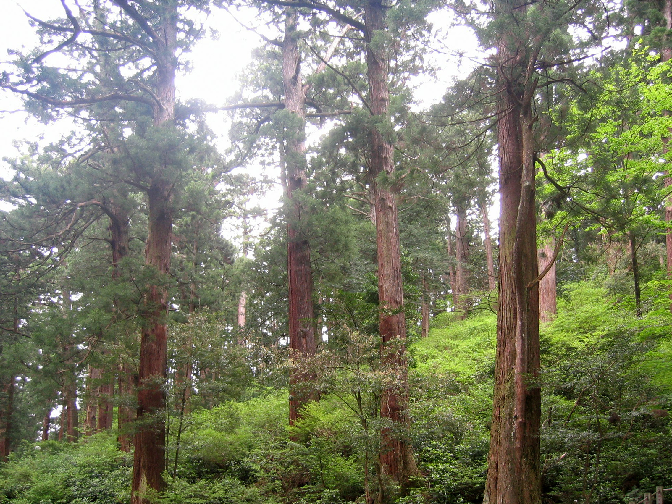 大雄山の杉林 Cryptomeria japonica